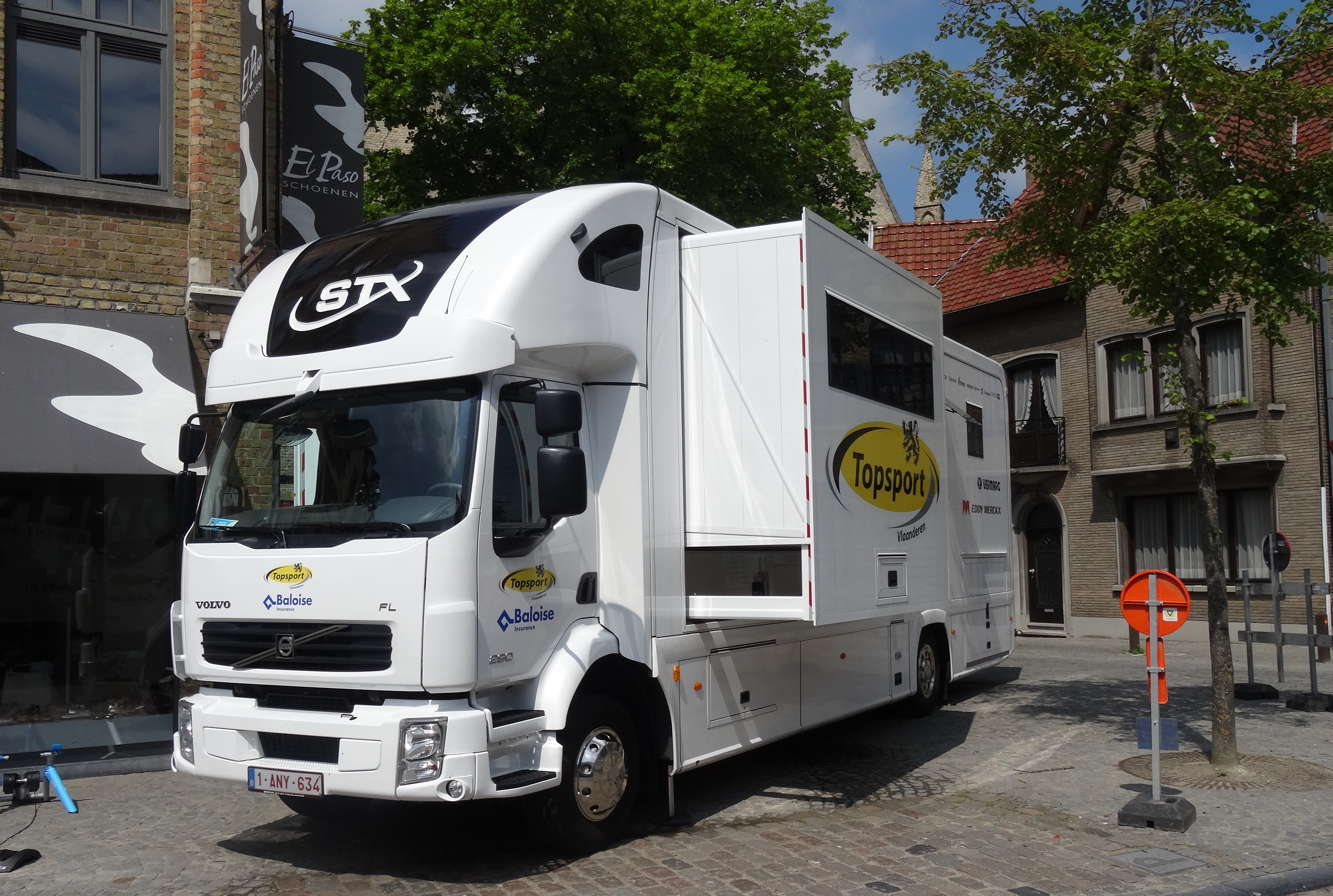 Reportage photographique réalisé le vendredi 30 mai à l'occasion du contre-la-montre individuel de la troisième étape du Tour de Belgique 2014 à Dixmude, Belgique.